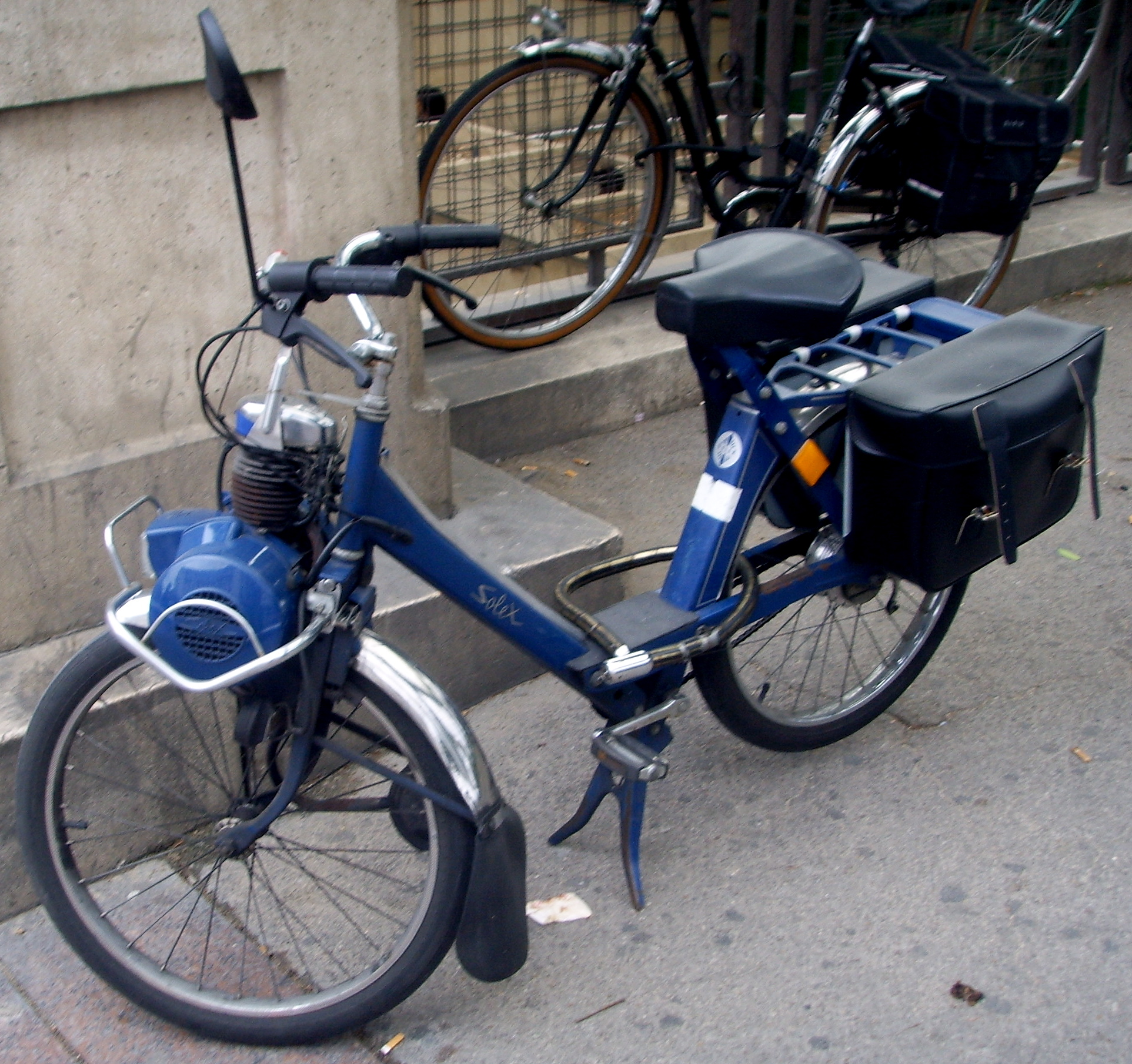 Blue Motobécane VelosoleX S3800